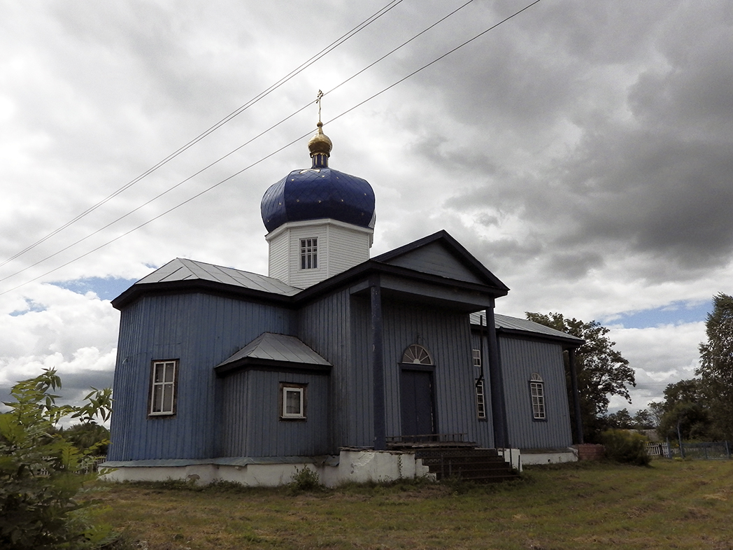 Церква Пресвятої Богородиці, с. Дерганівка